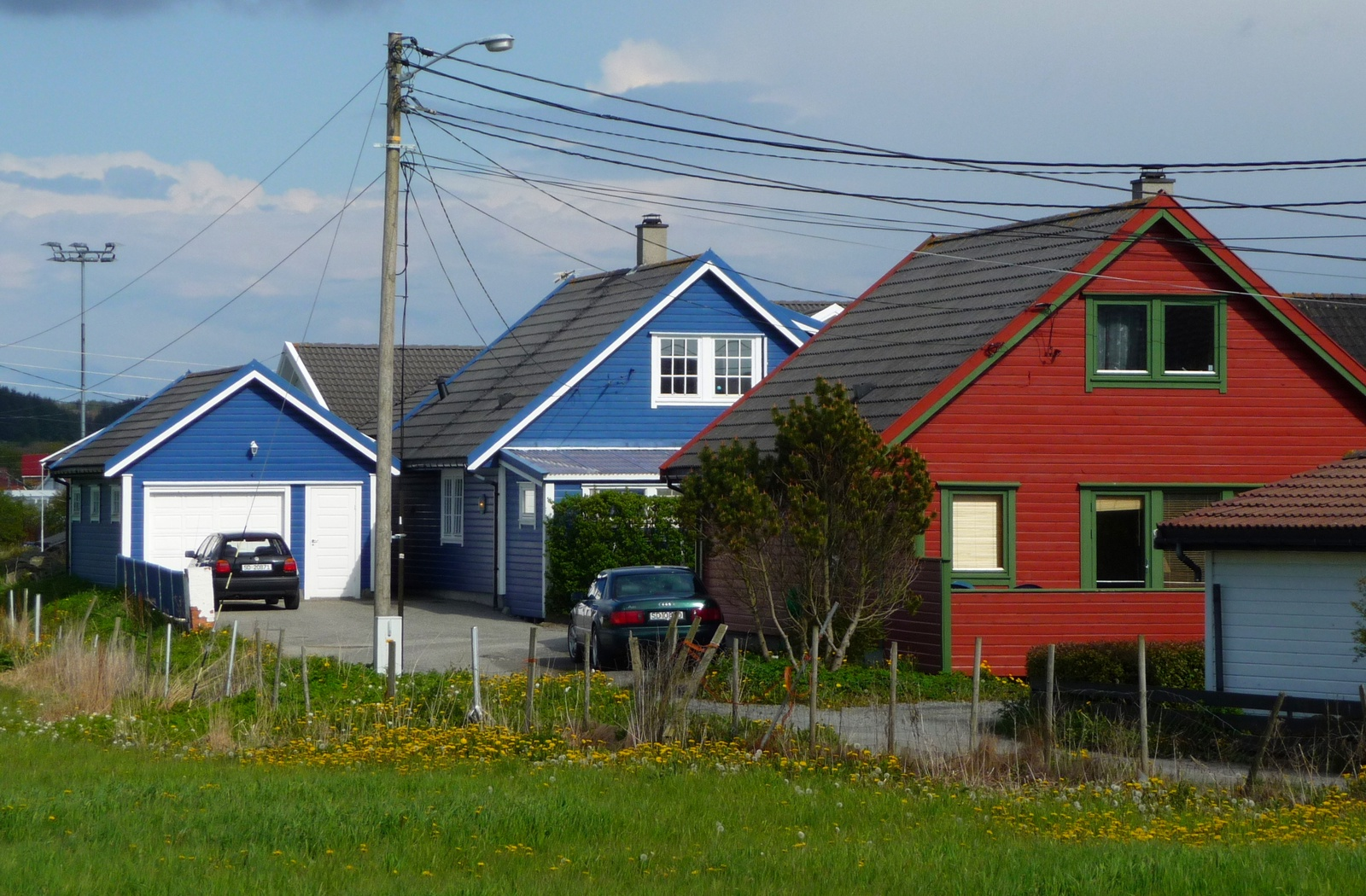 Åkrahamn 05.2010